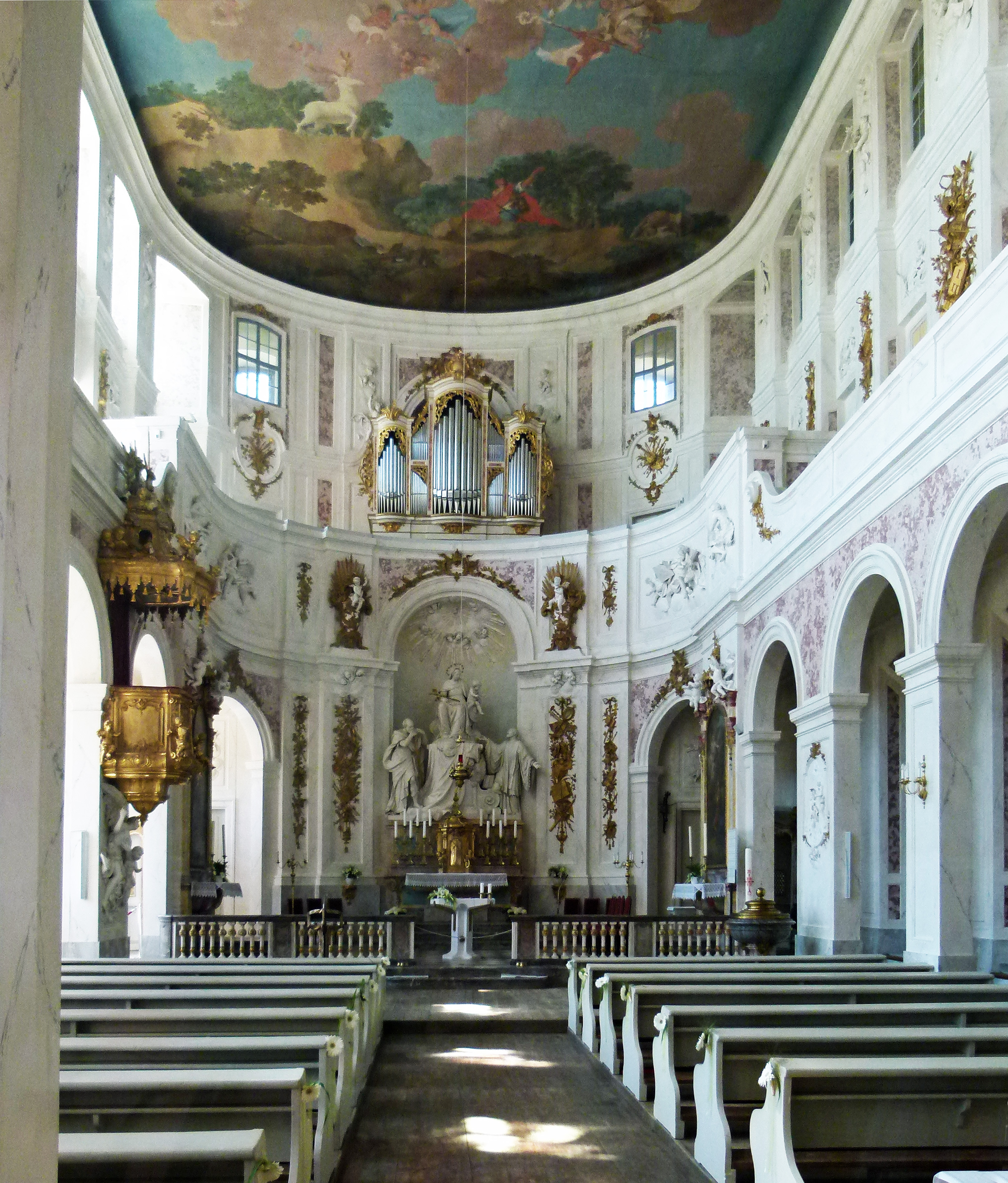 Schloss Hubertusburg, Wermsdorf, Sachsen